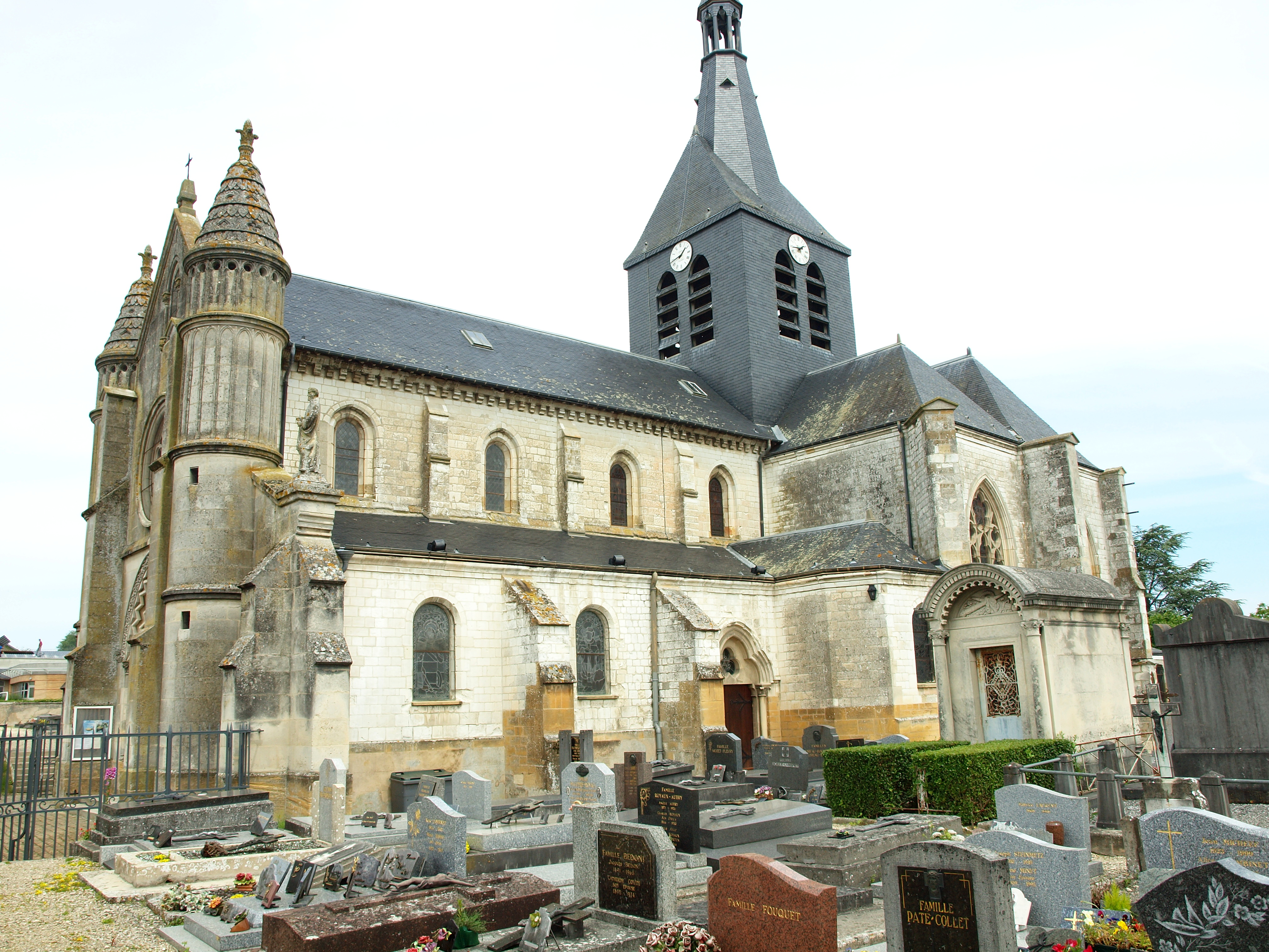 Église Saint-Pierre de Tagnon (Ardennes, France)